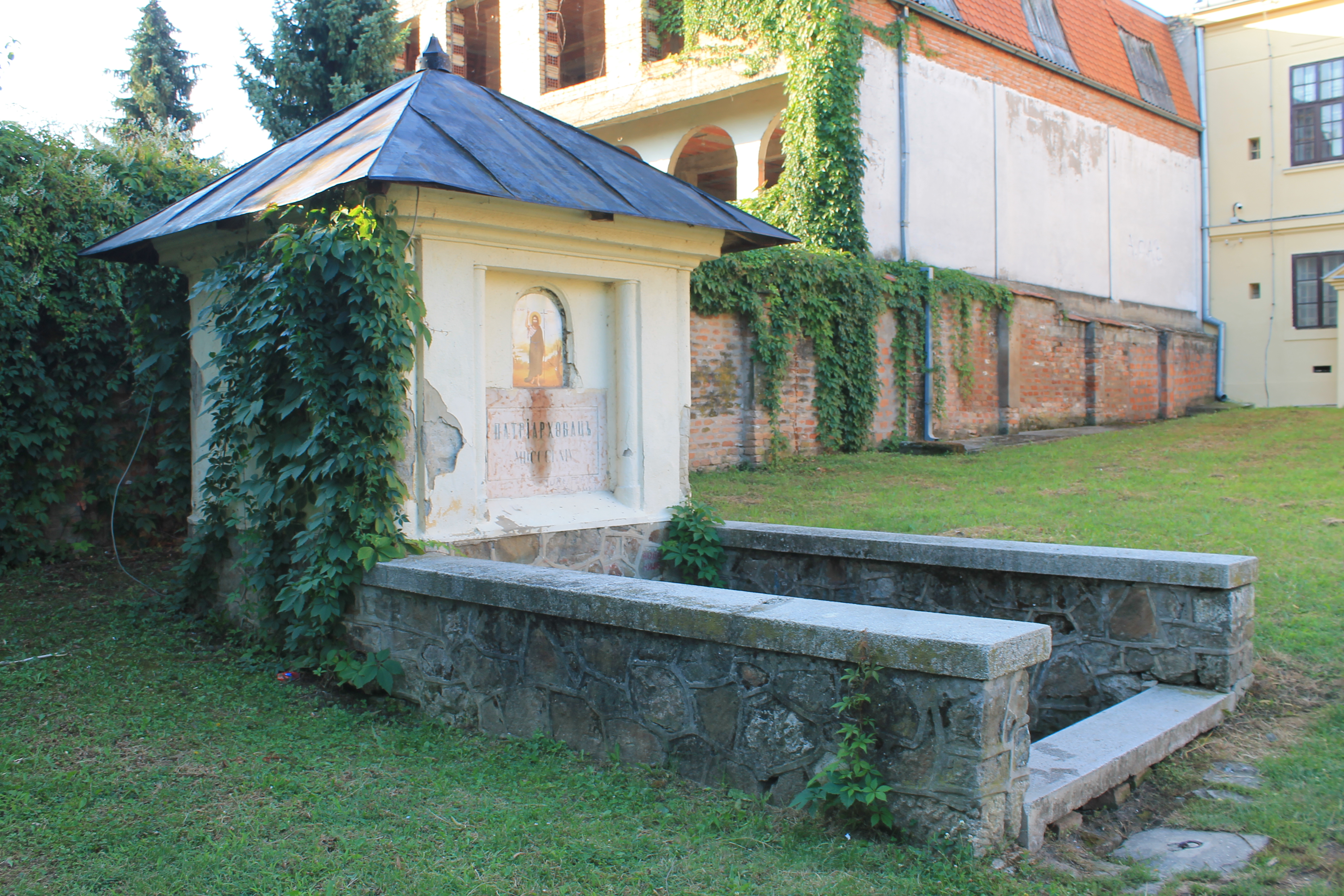 Česma Patrijarhovac